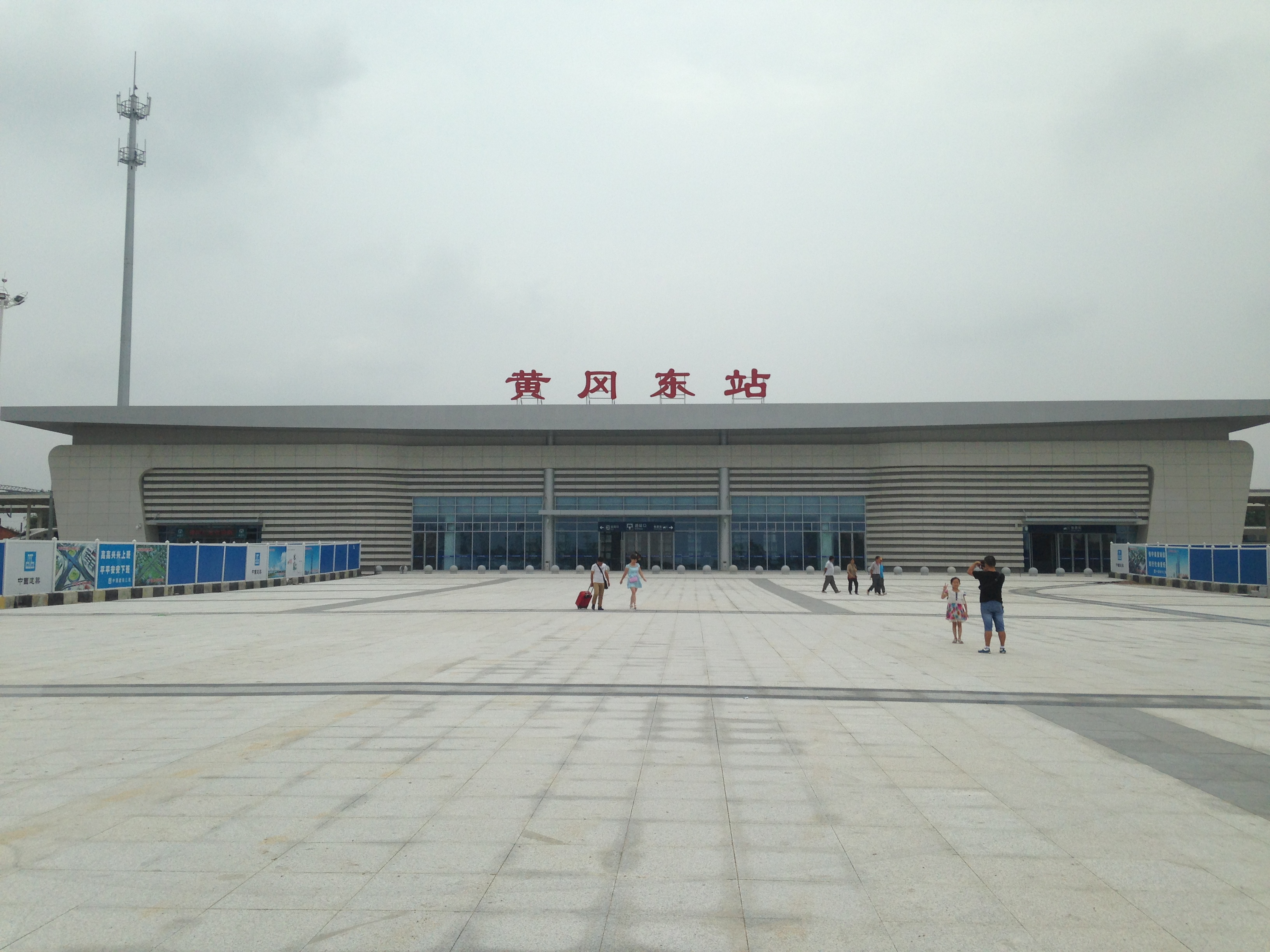 黄岡東駅の駅舎